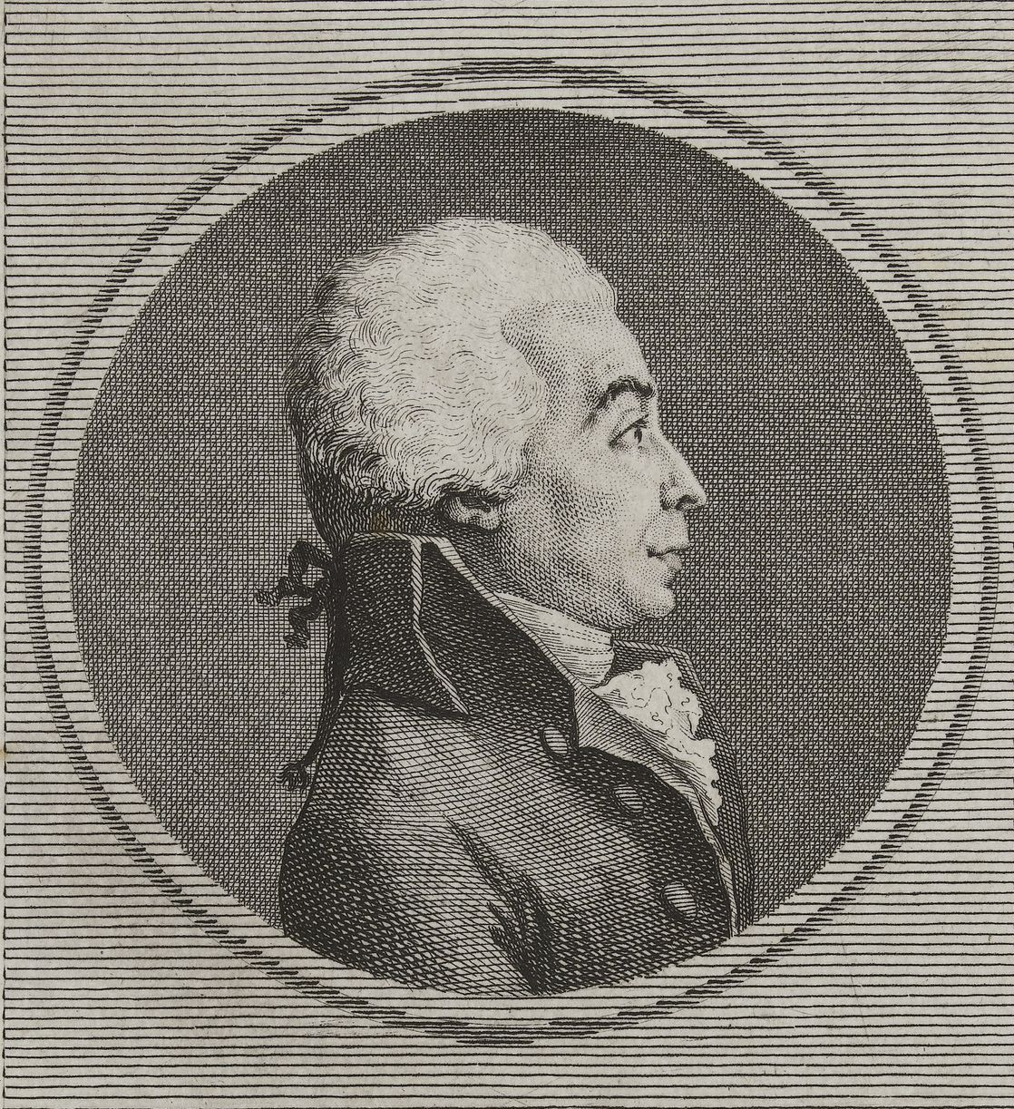 Dominique Garat l'aîné (1735-1799), avocat à Bordeaux, député du tiers aux Etats-Généraux de 1789, par le bailliage de Labour (Ustaritz) (Basses-Pyrénées)